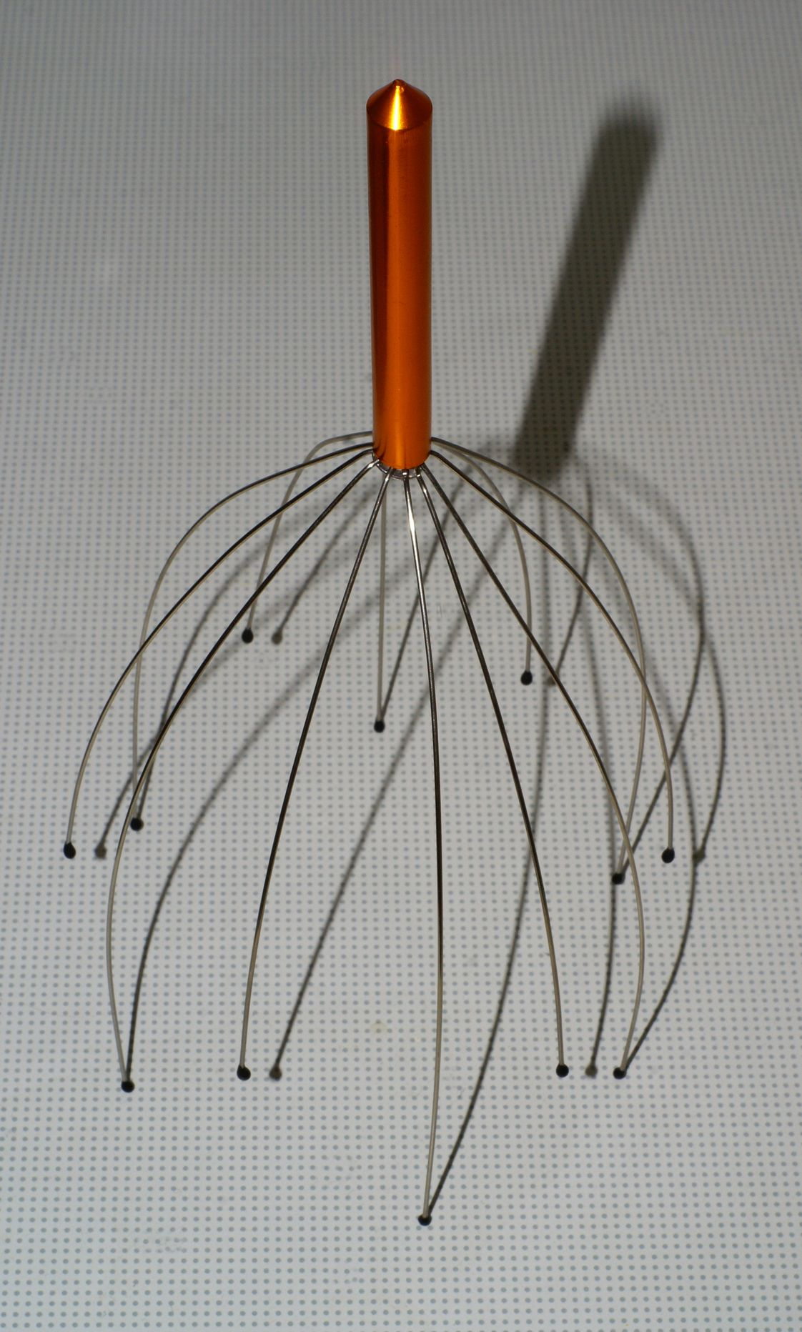 Sensus Magnus Kopf-Massagegerät